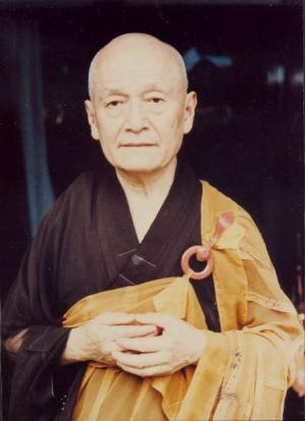 Master Chan-Yun (懺雲法師)